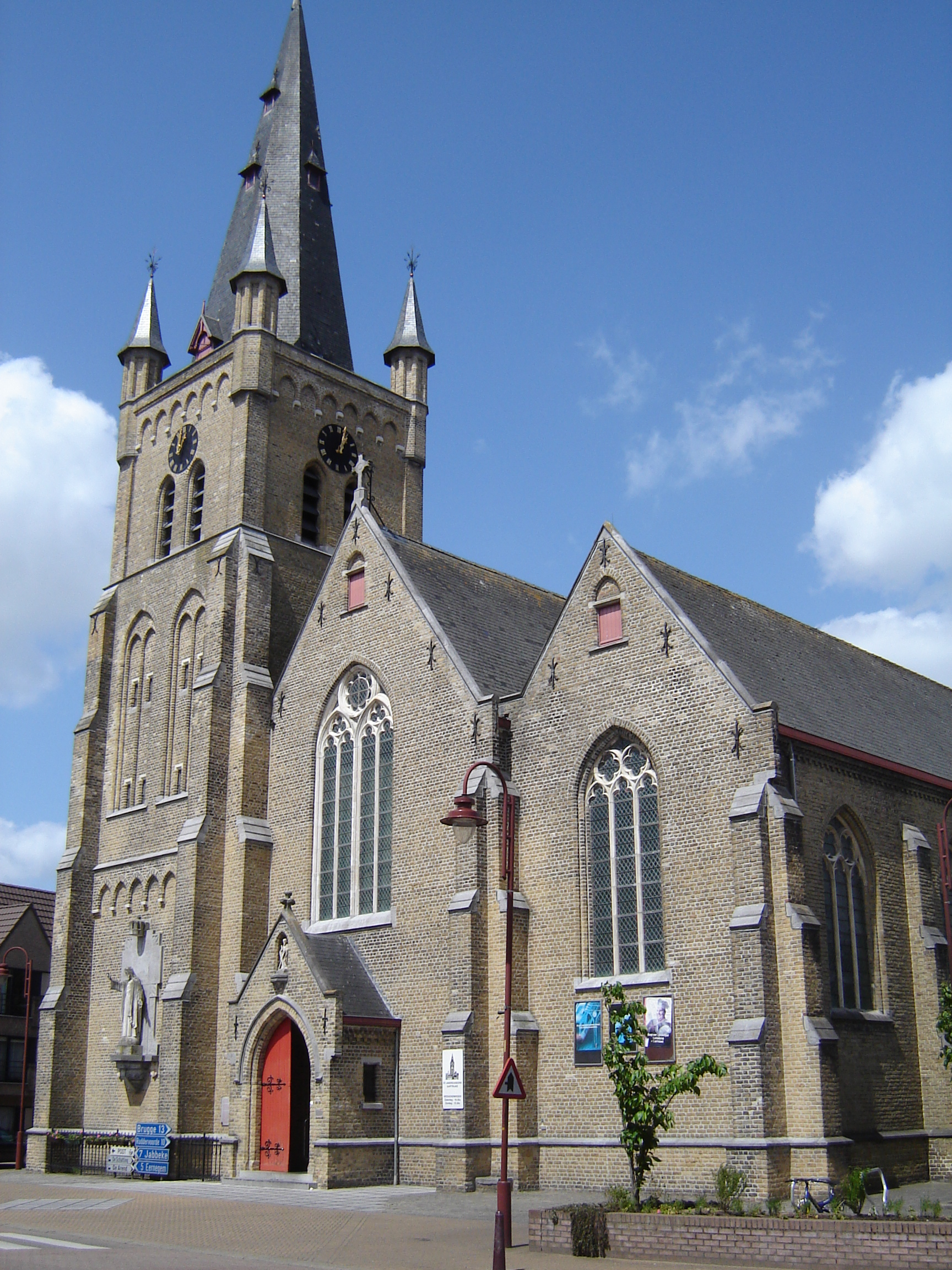 Sint-Andreaskerk in AartrijkeChurch of Saint Andrew in Aartrijke. Aartrijke, Zedelgem, West Flanders, Belgium